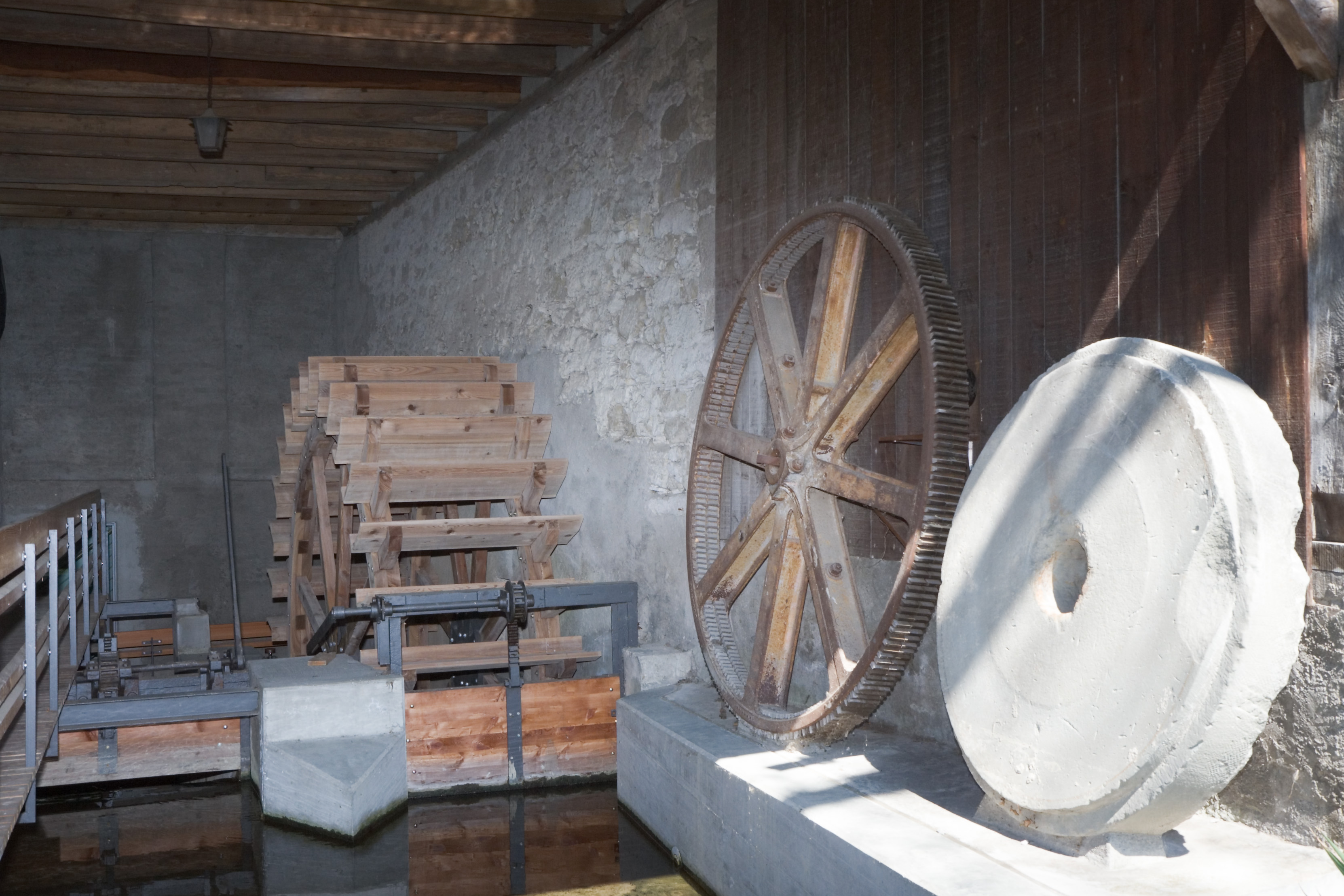 Was von der Mühle Hegi in Winterthur übriggeblieben ist: Ein abgestelltes Wasserrad in einem Wohnhaus.